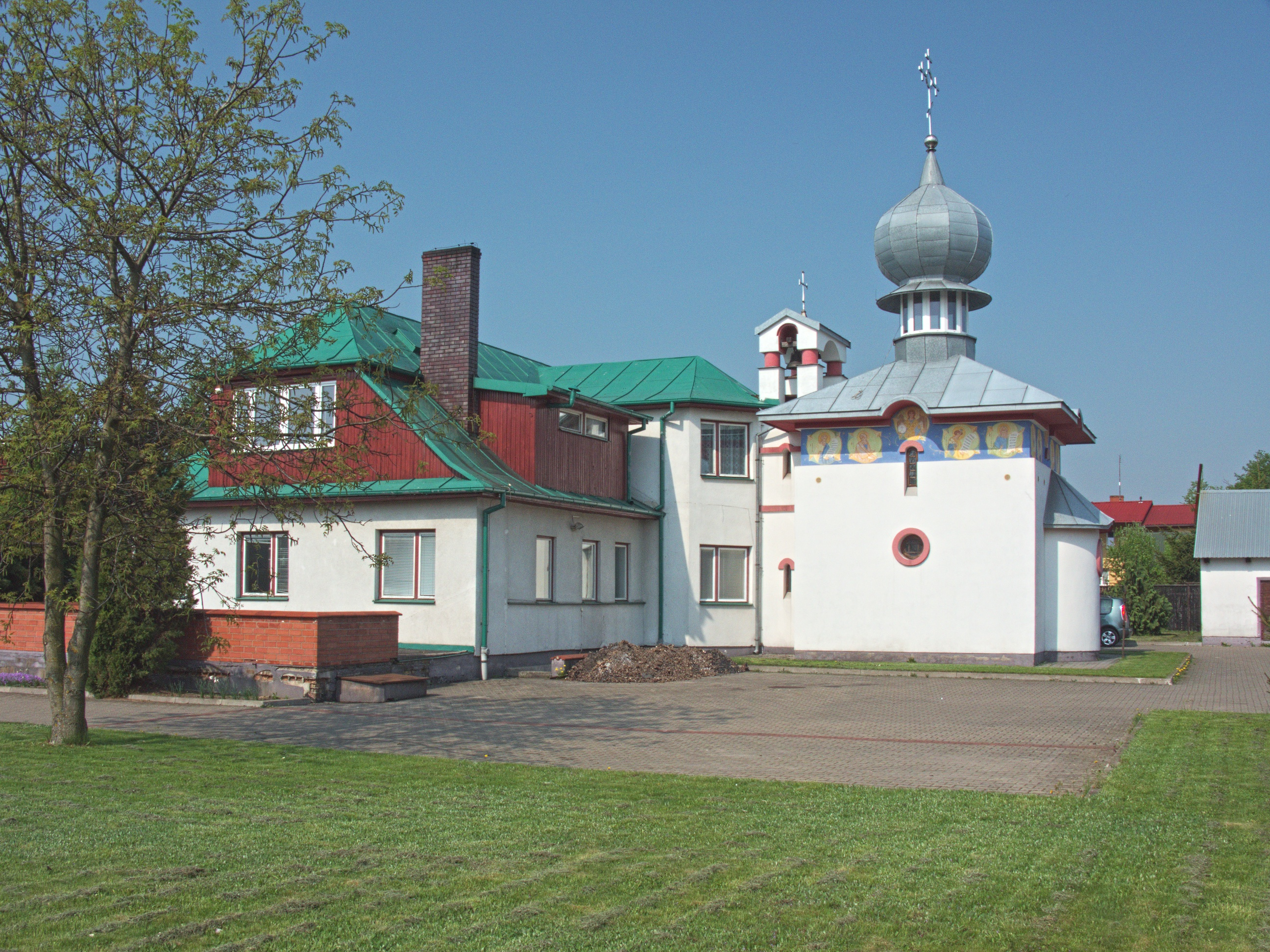 Kaplica Świętej Trójcy przy Policealnym Studium Ikonograficznym w Bielsku Podlaskim.